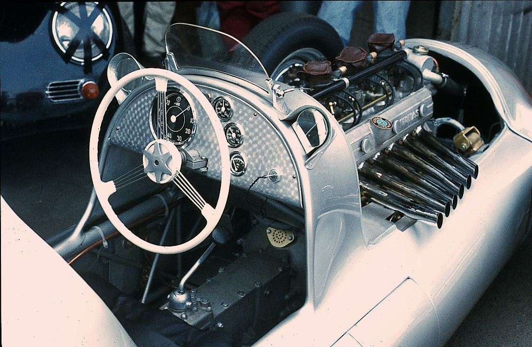 Veritas Meteor, Formel-2-Monoposto, Bauzeit und Einsatz 1949 bis 1953, im Fahrerlager des Nürburgrings beim Oldtimer-Grand-Prix